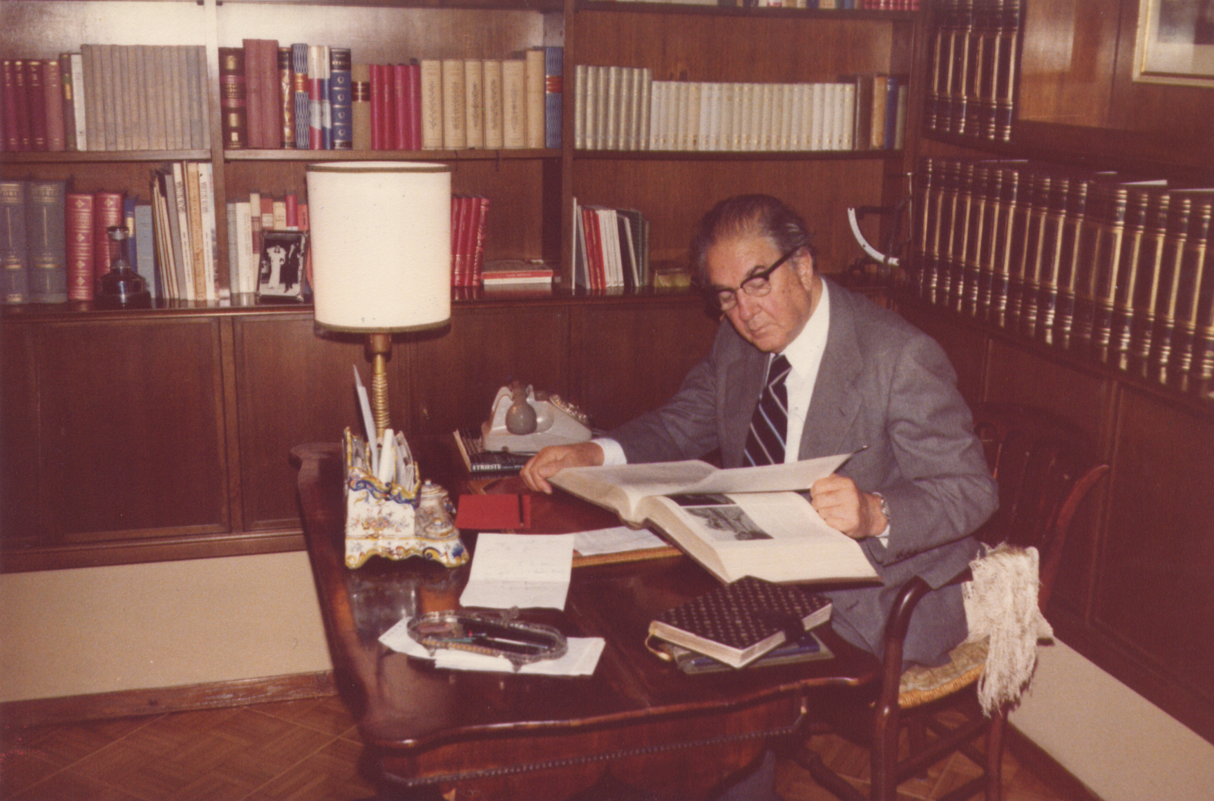 Raoul Puhali nel suo soggiorno